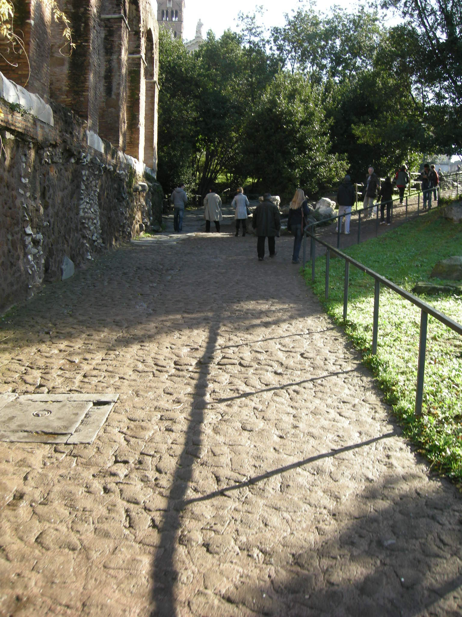 Sacra via summa